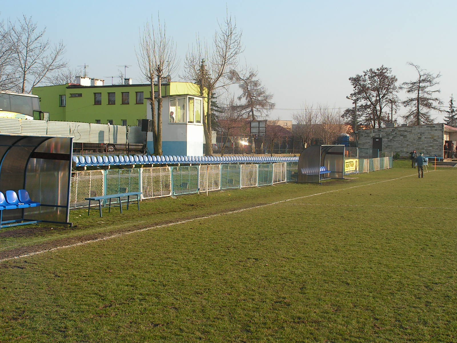 Trybuny stadionu przy ulicy Targowej od strony wschodniej.